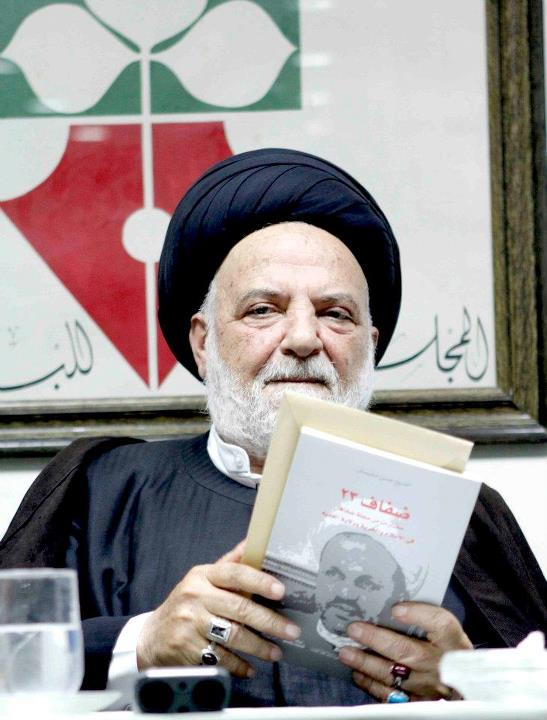 السيد محمد حسن الأمين